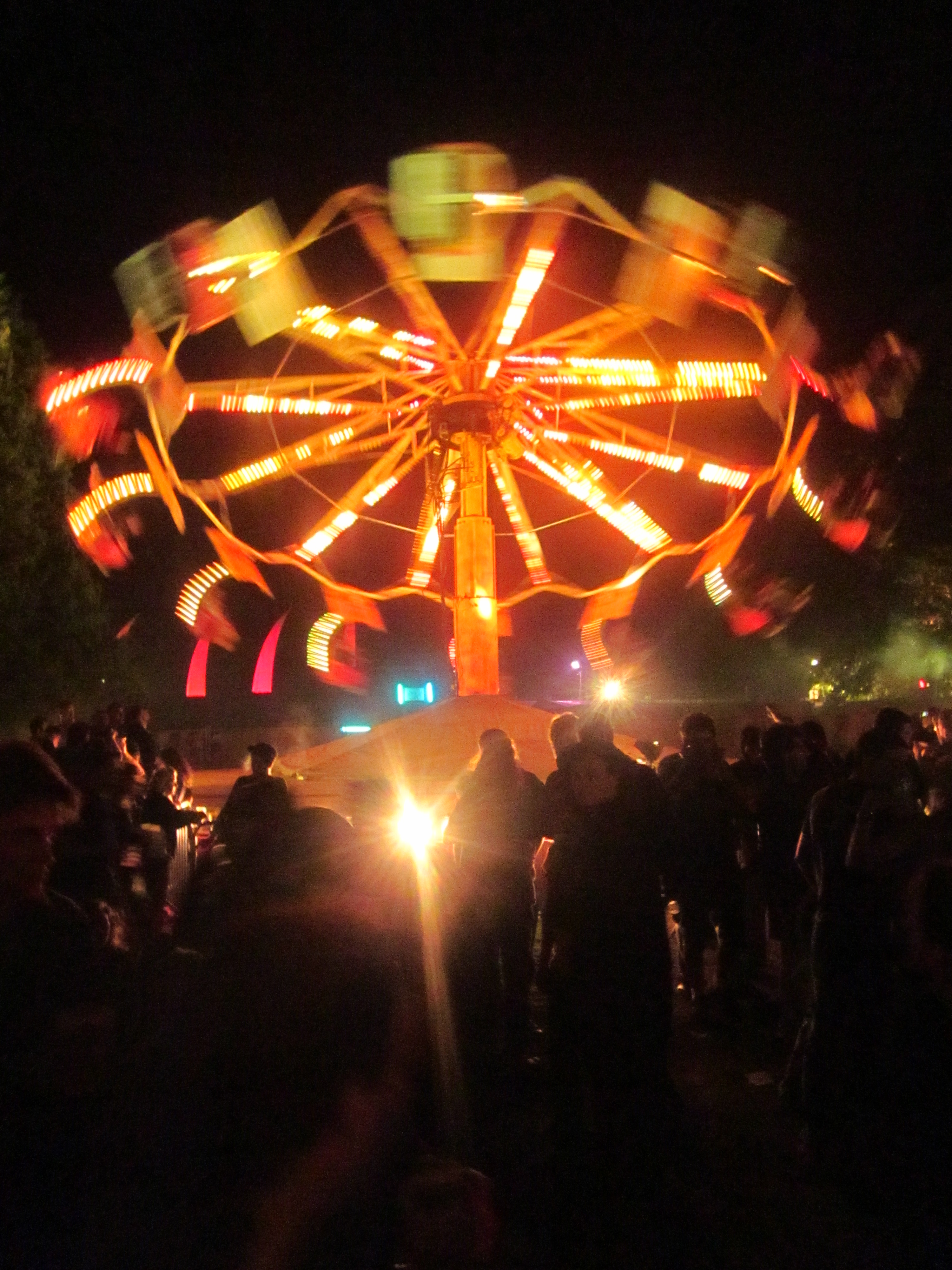 Festival Astropolis, Brest, 2011